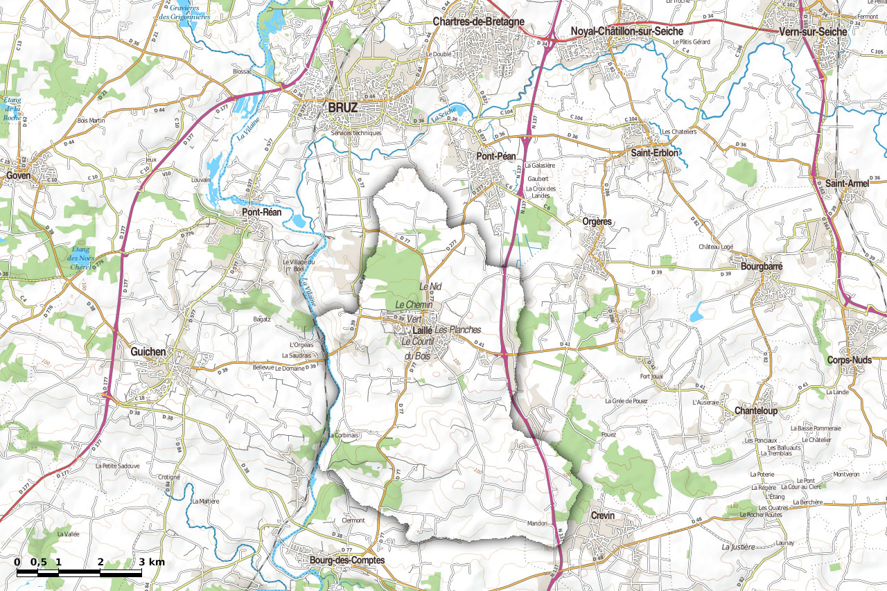 Carte de la commune de Laillé, France, code Insee 35139